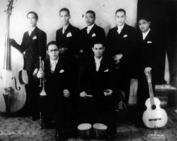 Septeto Puerto Rico, ca. 1930. Left to right, standing: Fernando Pizarro "Nandí" (double bass), Pompilio Gutierrez "Pompo" (vocals, maracas), Roberto Maunez (vocals), Leocadio Vizcarrondo (director, guitar), Guillermo Ayala "Piliche" (Puerto Rican tres). Left to right, sitting: Juanchín Ramírez (trumpet), Emilio "Yiyo" Fuentes (bongo).